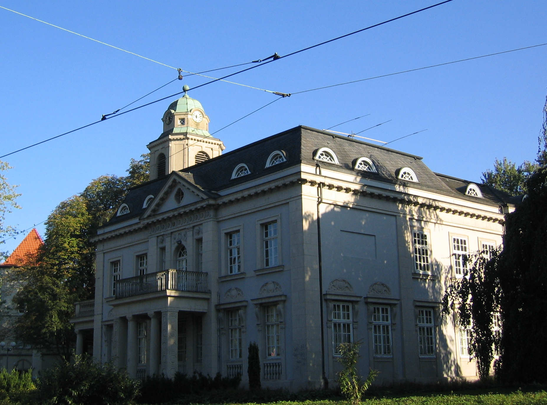 Haus Schulte-Witten in Dortmund Dorstfeld Eigene Aufnahme September 2006